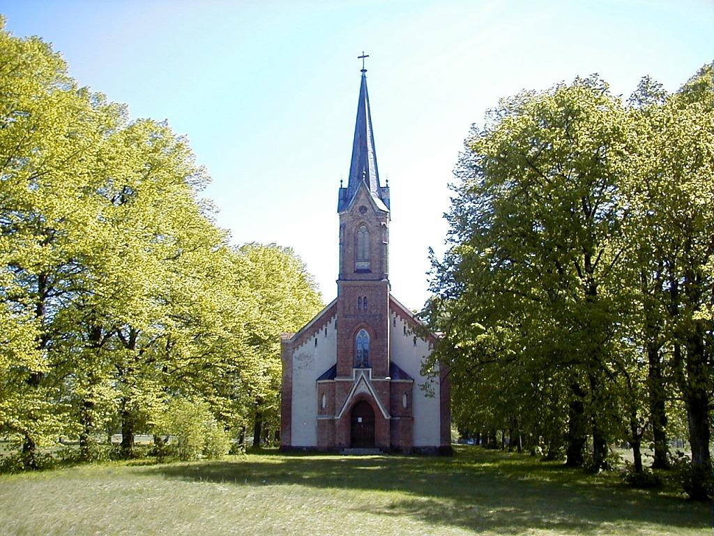 Piņķu baznīca 2000-05-06